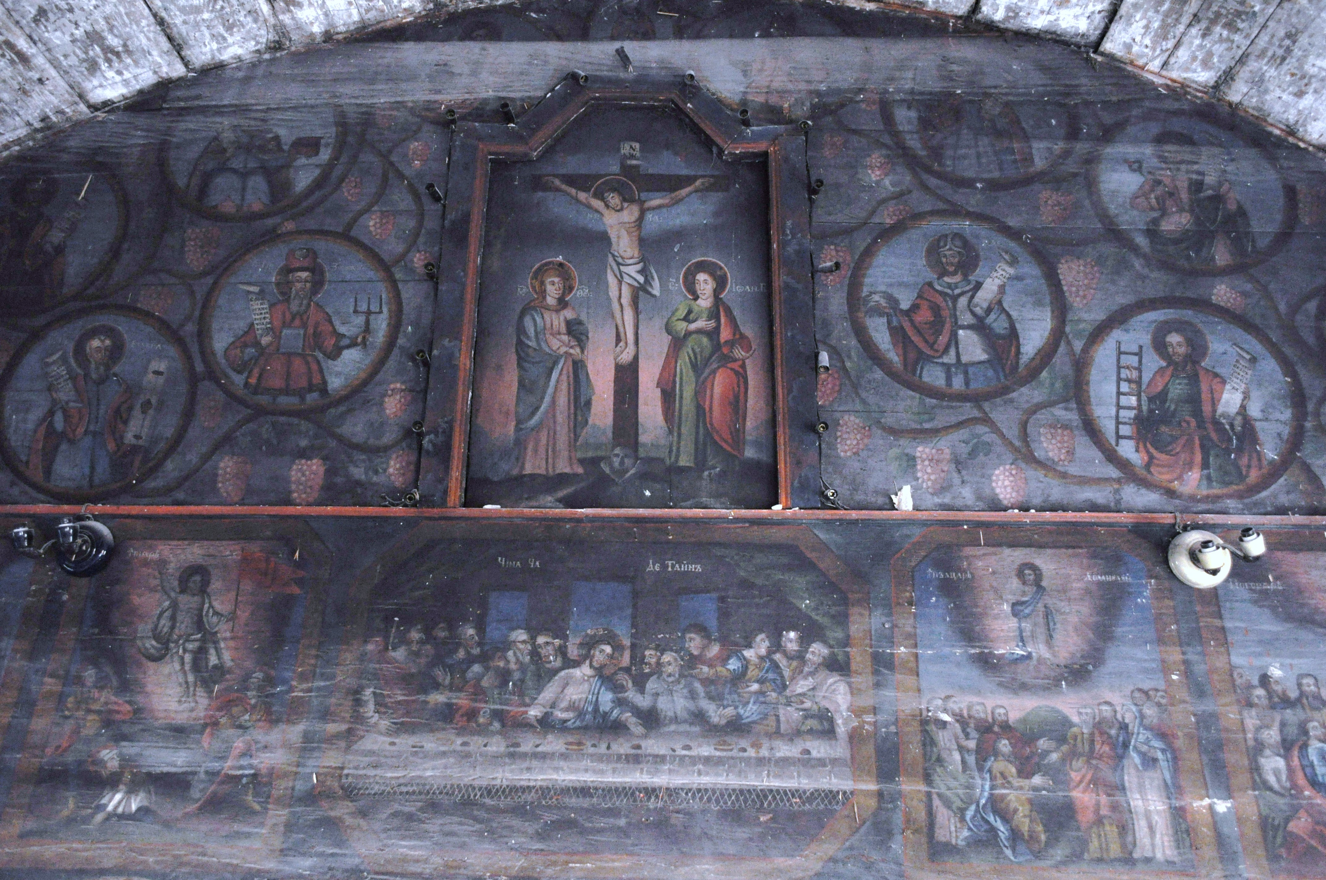 Biserica de lemn „Sfântul Mare Mucenic Gheorghe” din Ionești, județul Arad